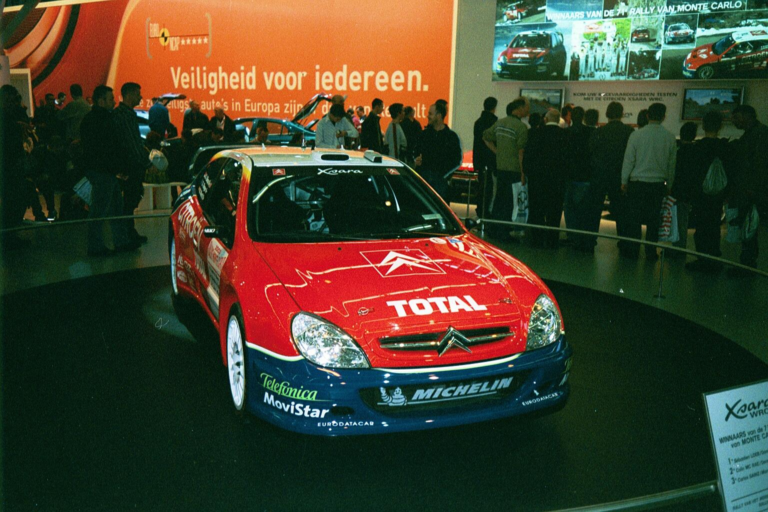 Description Citroën Xsara WRC op de RAI (Amsterdam) DateFebruary 2003SourceOwn workAuthorJan CLevering Citroën Xsara WRC op de RAI (Amsterdam)